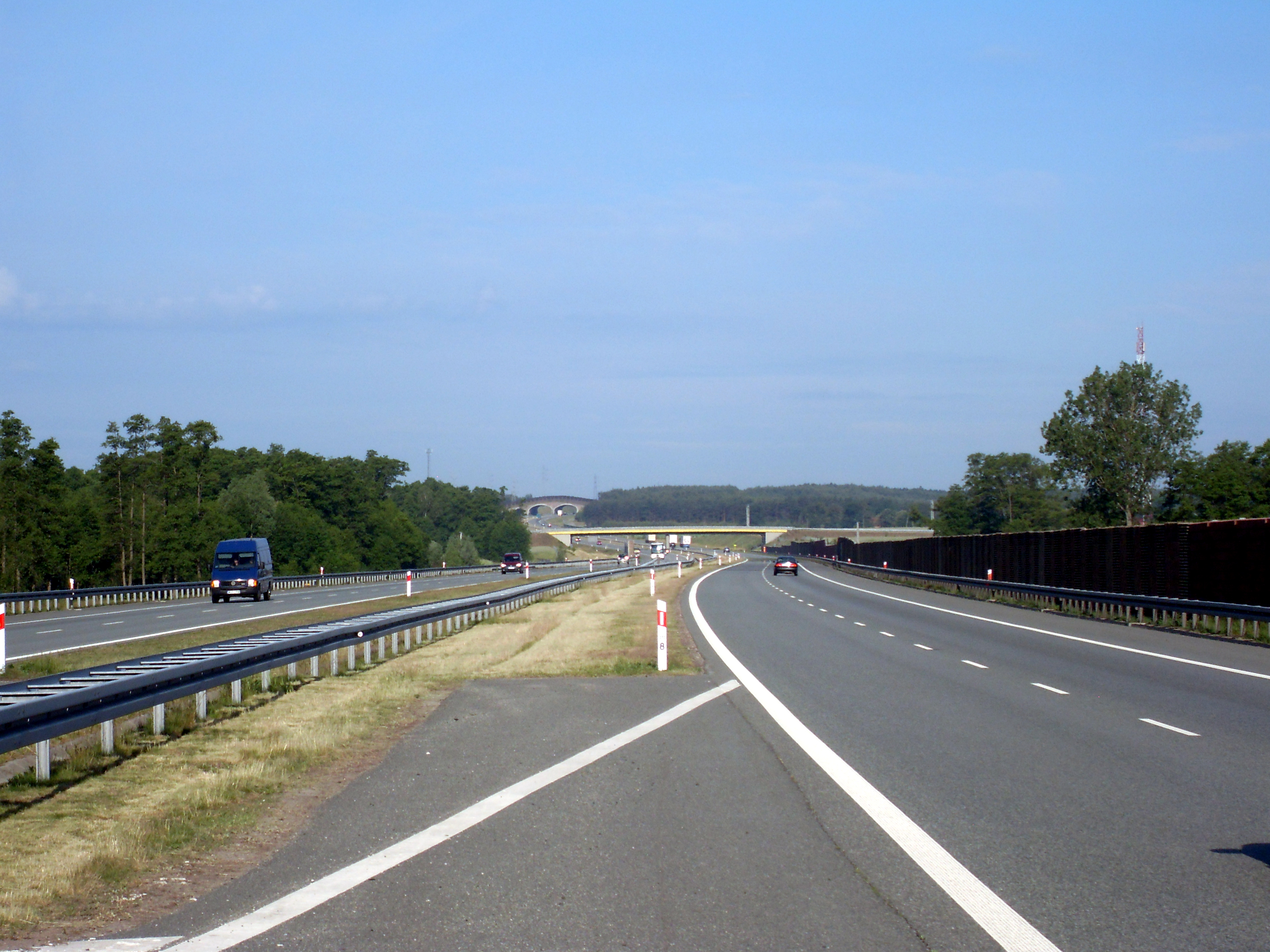 Autostrada A2 pomiędzy Strykowem, a Koninem. Widok w kierunku zachodnim.